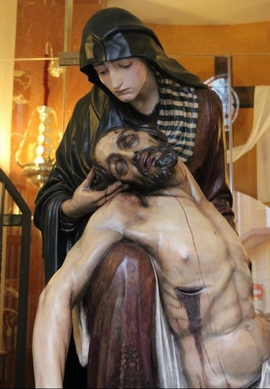 Virgen de la Piedad de Málaga